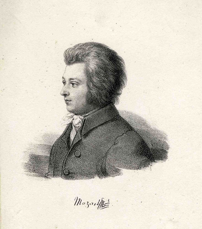 Wolfgag Amadeus Mozart nach dem Porträt seines Schwagers Joseph Lange, Lithographie; um 1840